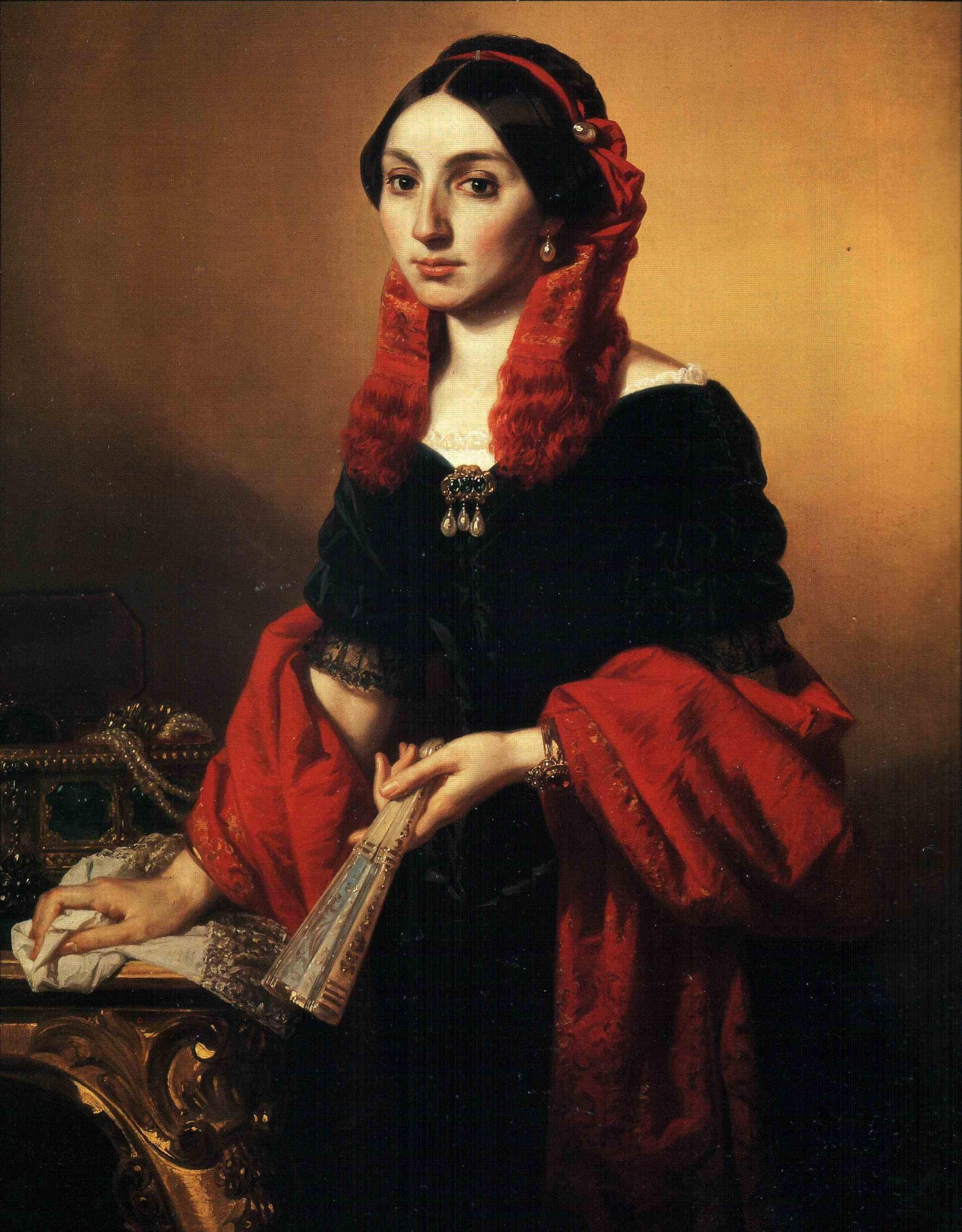 Louisa Maria di Borbone Francia, olio su tela di Domenico Scattola. Museo Glauco Lombardi, Parma.